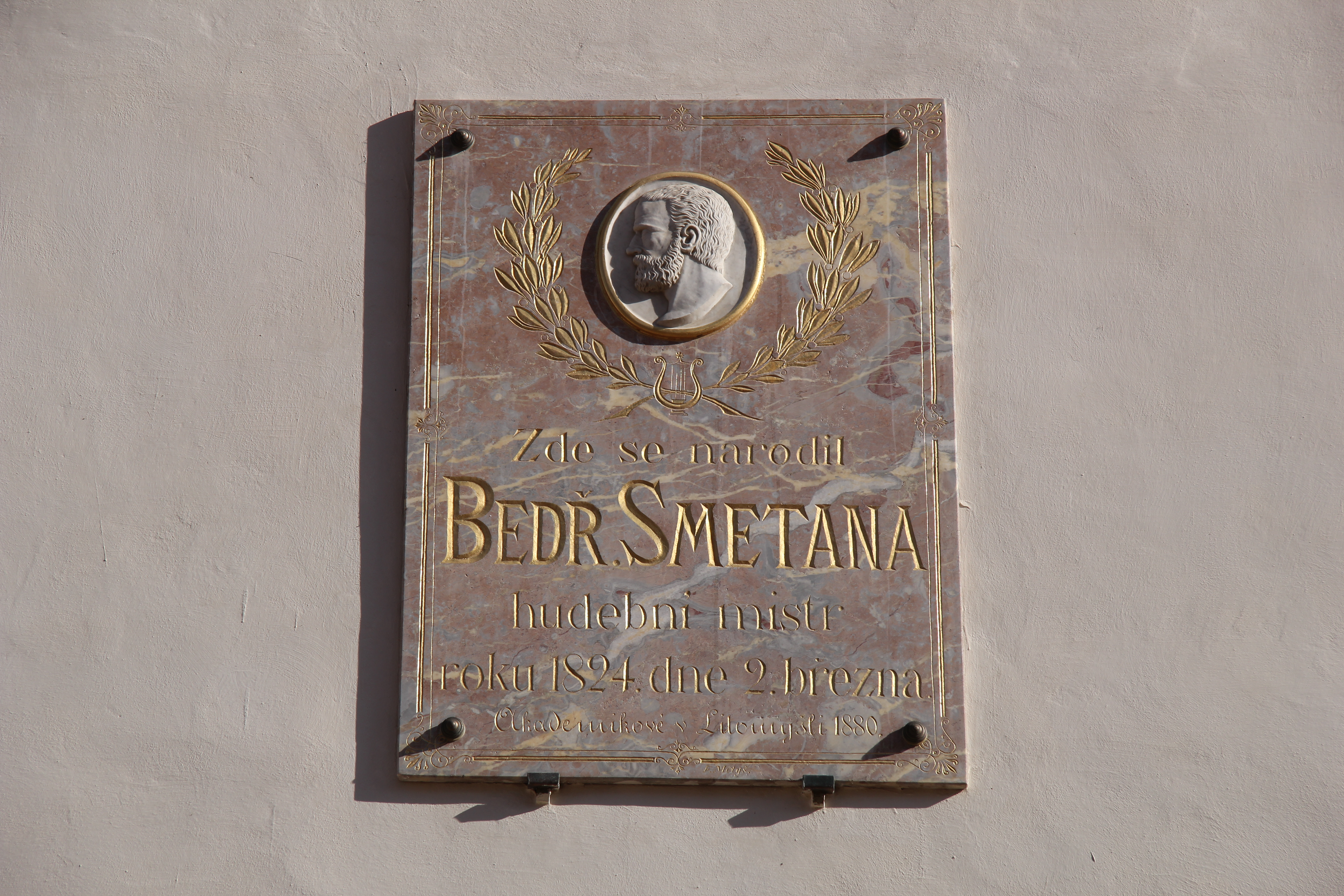 Pamětní deska Bedřicha Smetany na budově zámeckého pivovaru v Litomyšli z roku 1880 (2017)